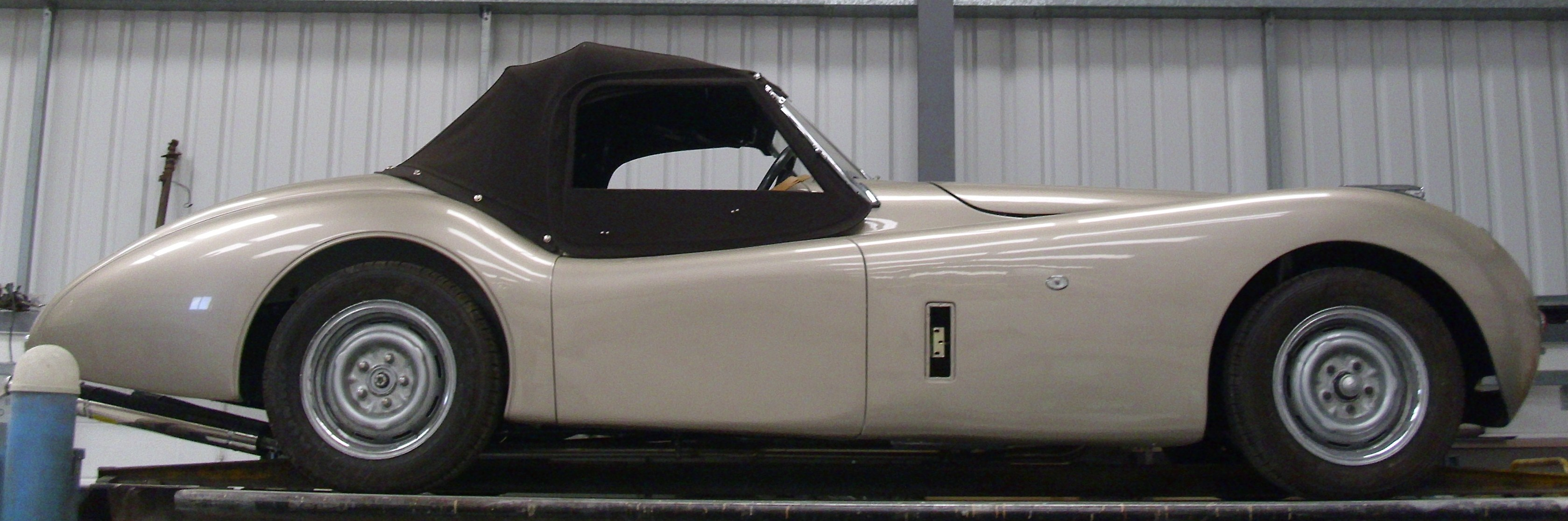 Nostalgia XK 2015